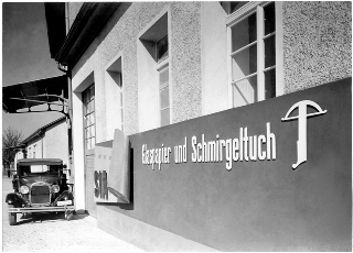 Historyczna fabryka papierów ściernych we Frauenfeld/Szwajcaria. Rok 1930.